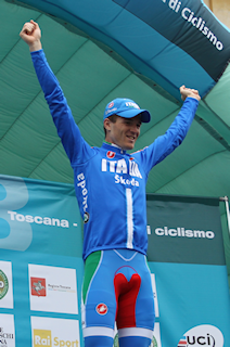 Salvatore Puccio sul podio in Toscana (Coppa delle Nazioni U23)